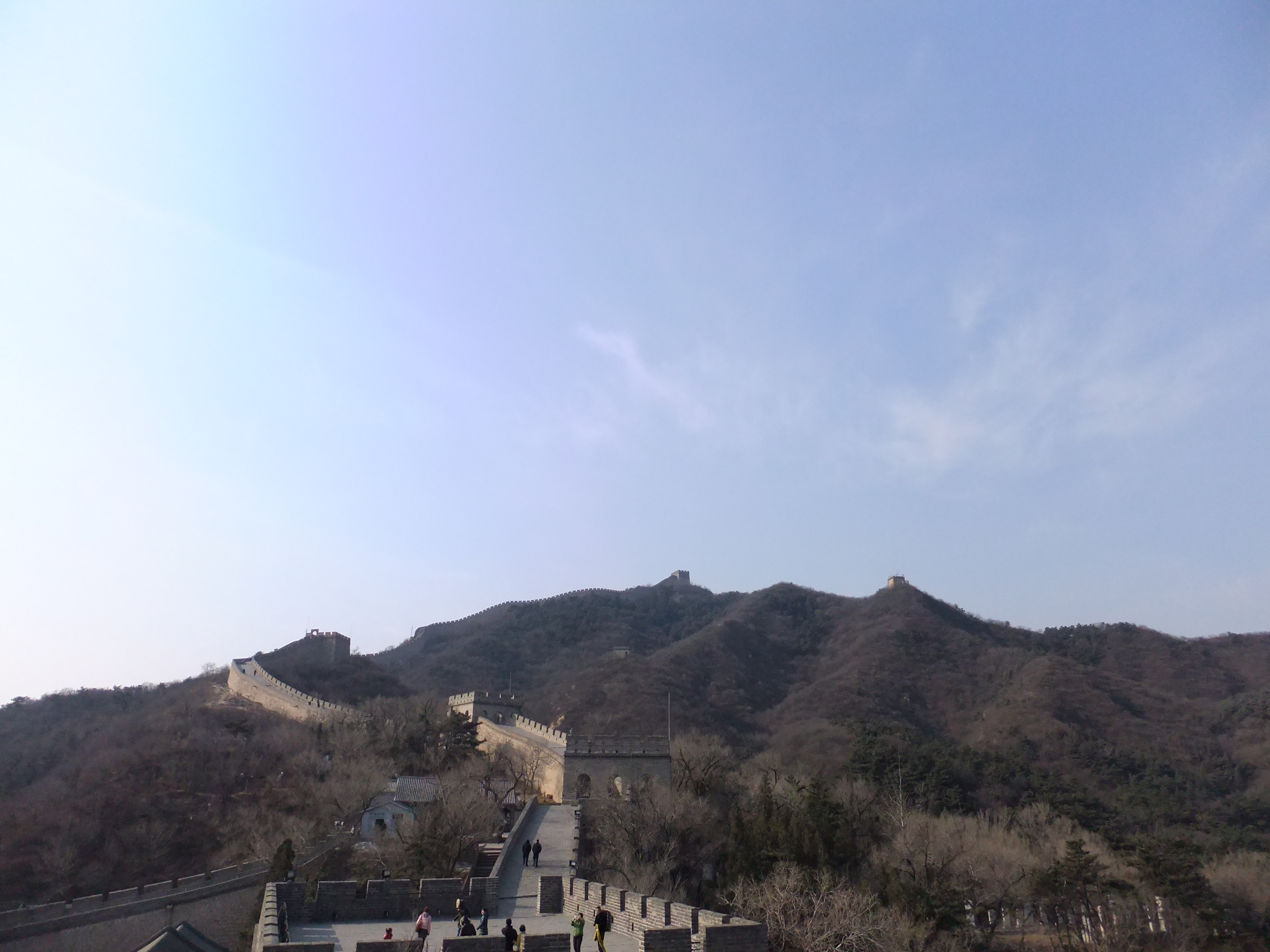 万里の長城八達嶺長城